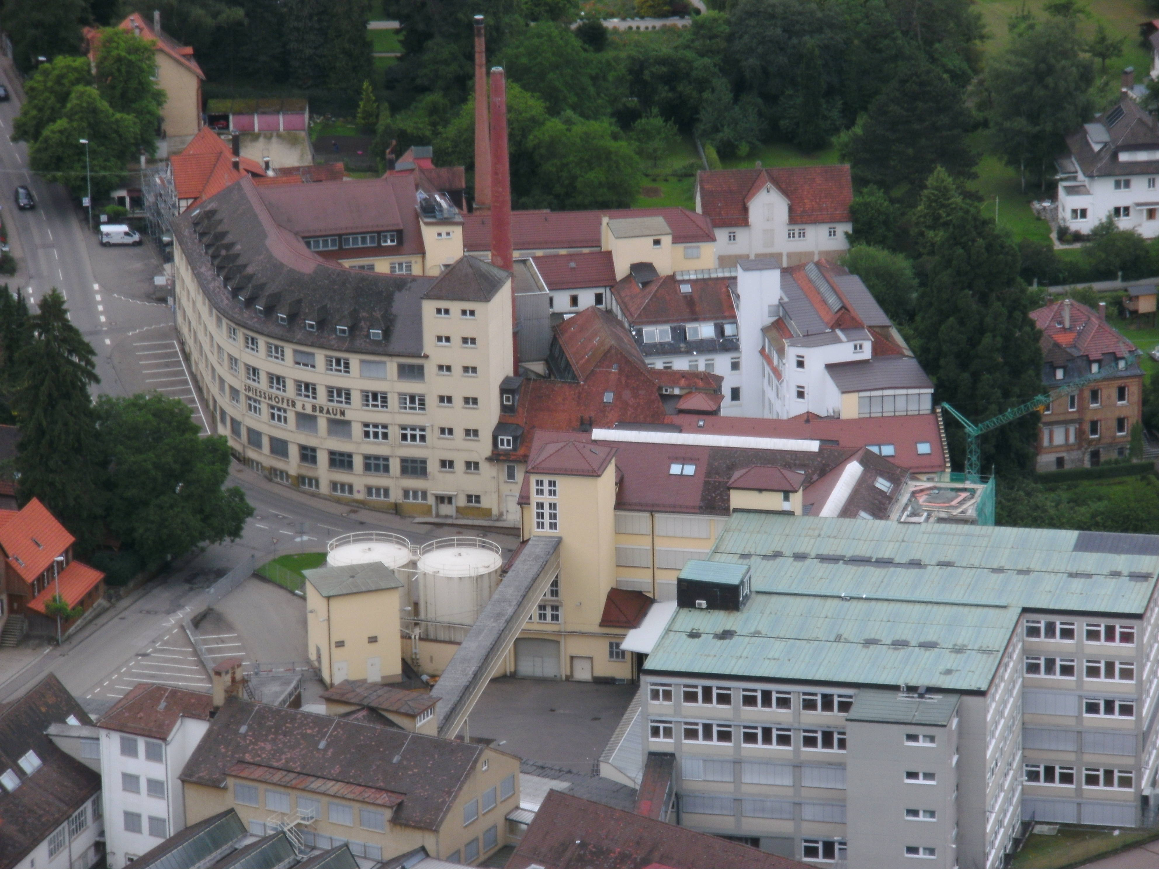 Firmengebäude der Firma Spiesshofer & Braun in Heubach, von der Ruine Rosenstein aus gesehen.